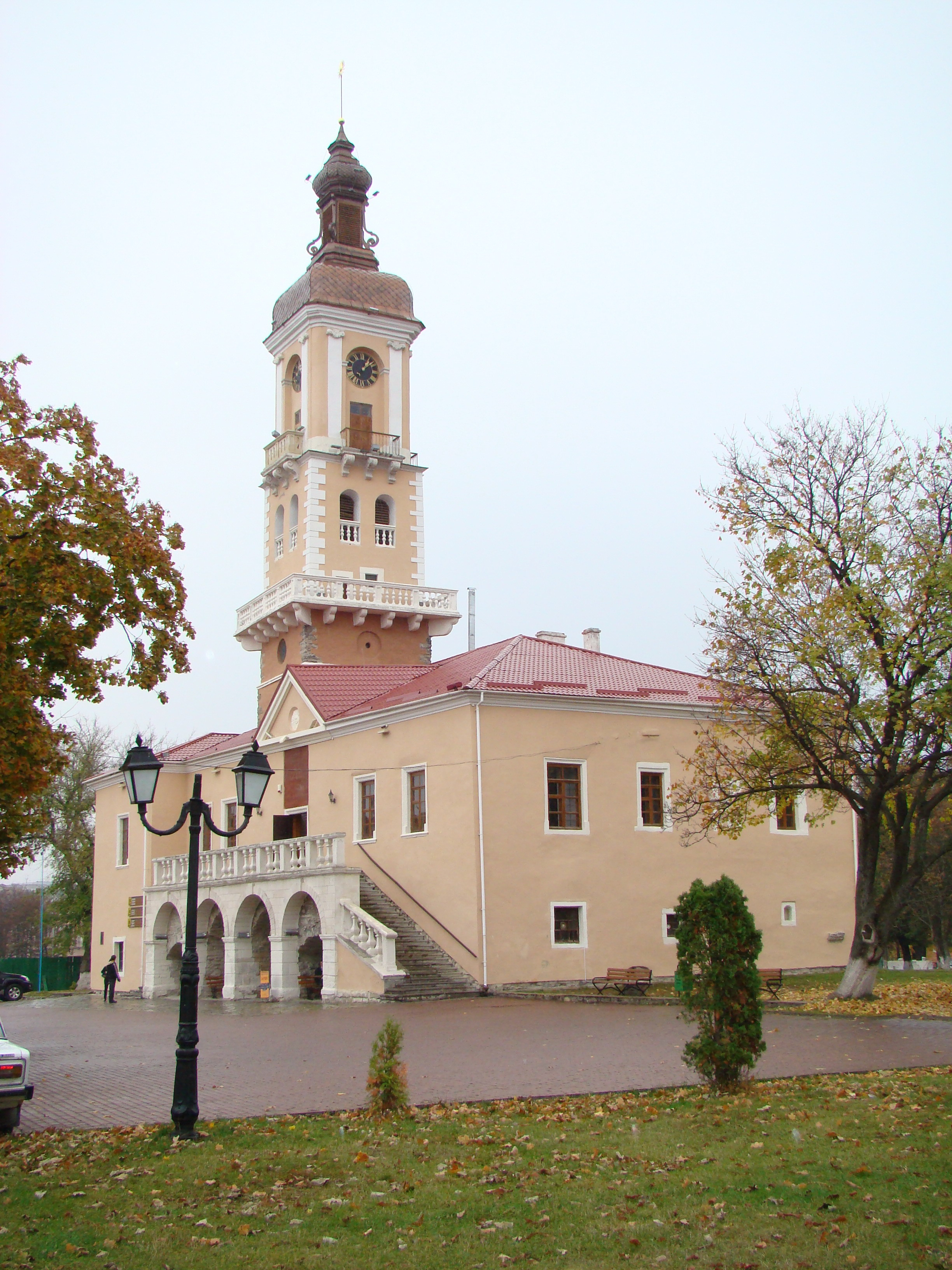 Будинок польського магістрату. Кам'янець-Подільський